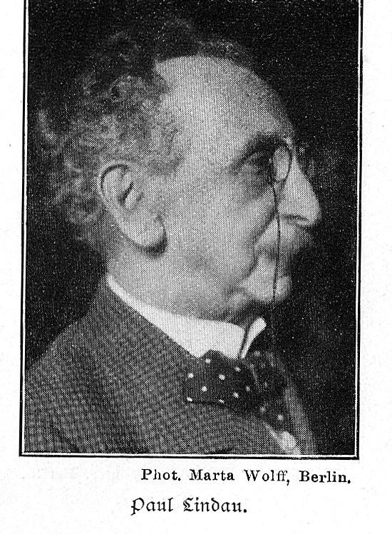 Aus Spemanns goldenes Buch des Theaters, 1902. Scan --Goerdten 21:33, 4. Feb. 2007 (CET)